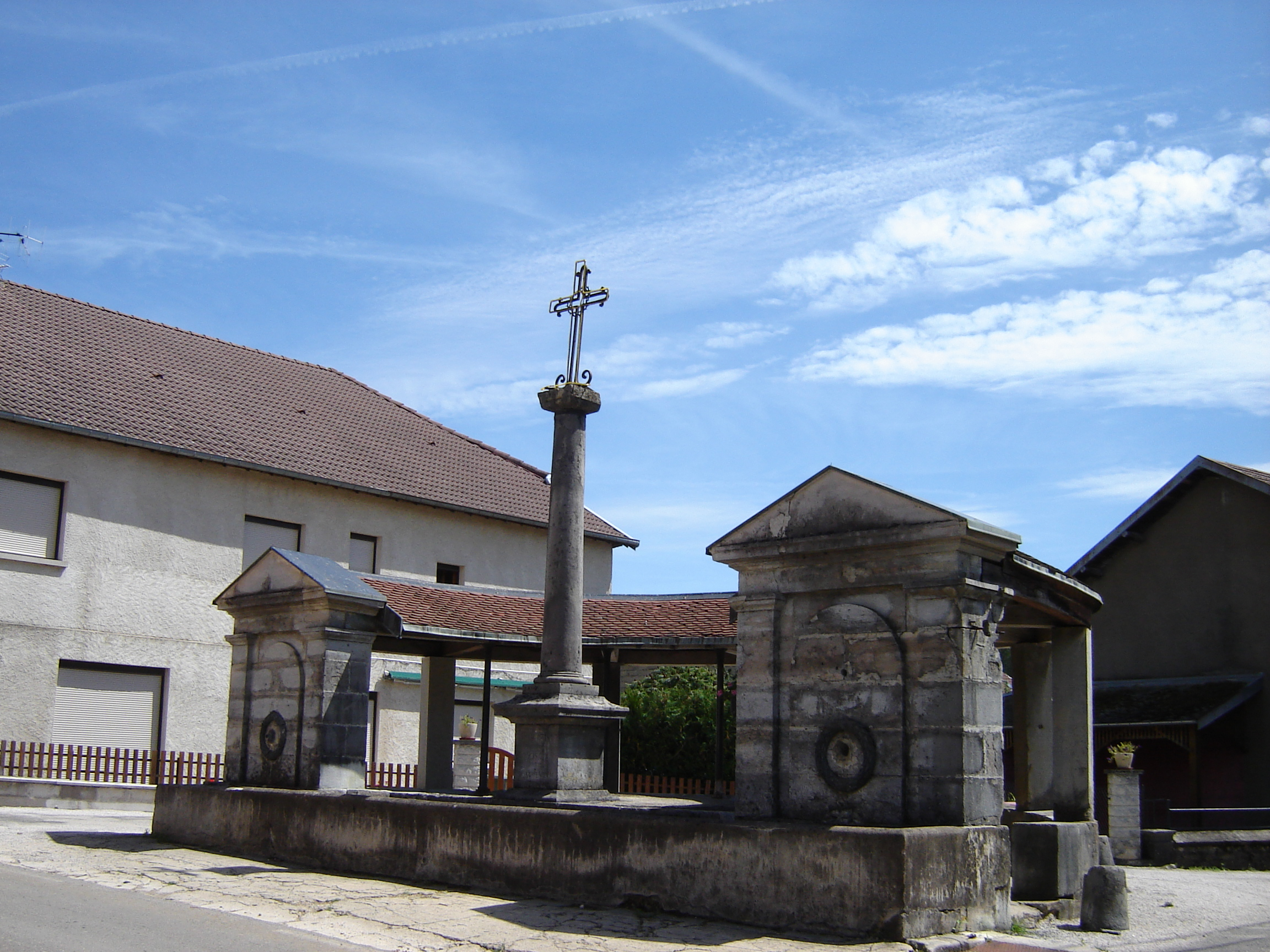 Fontaine semi-circulaire de 1826 ; pierre ;architecte : Maximilien Painchaux